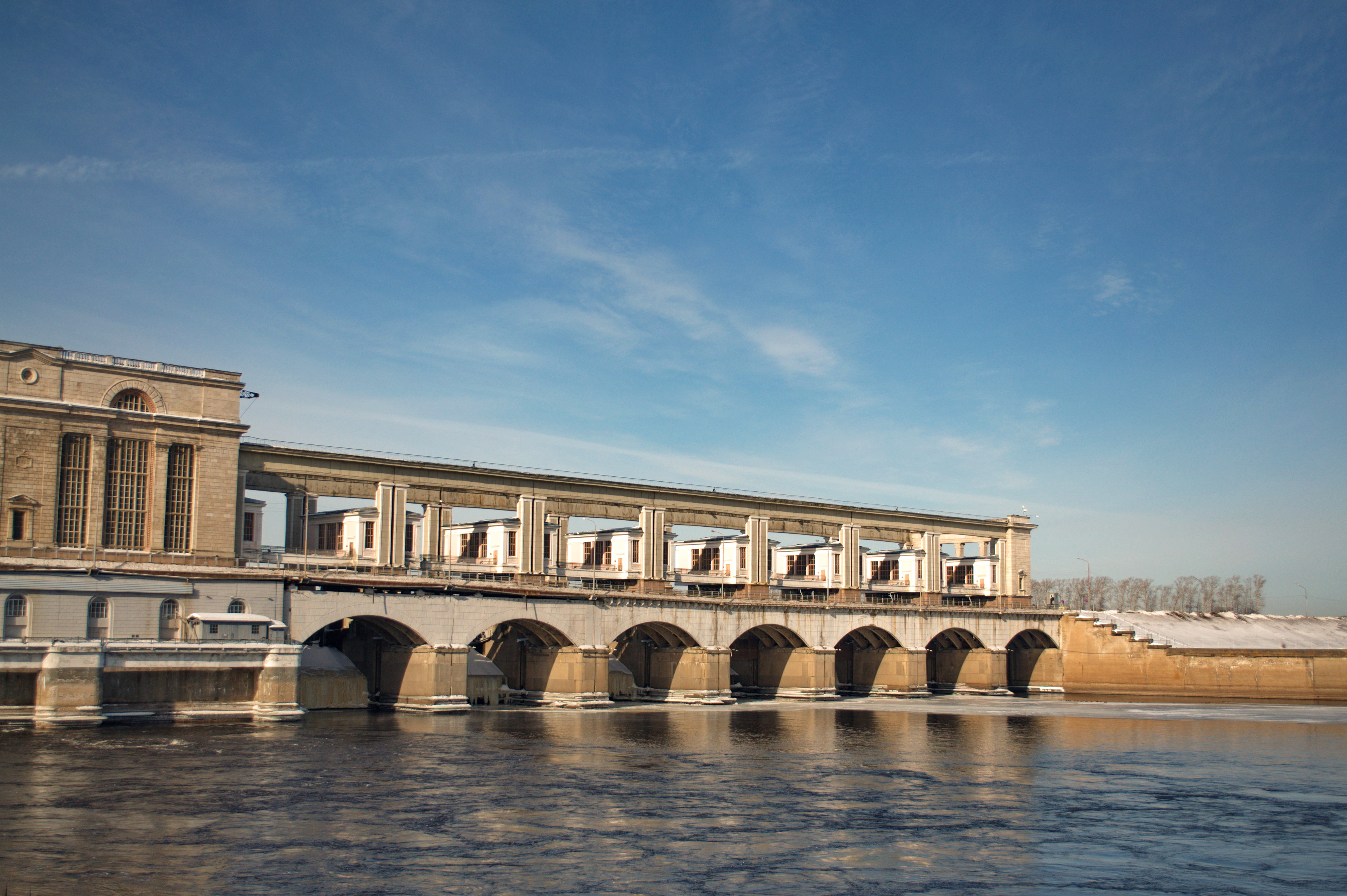 Здание гэс (Ярославская область, Углич, улица Карла Маркса, 33)